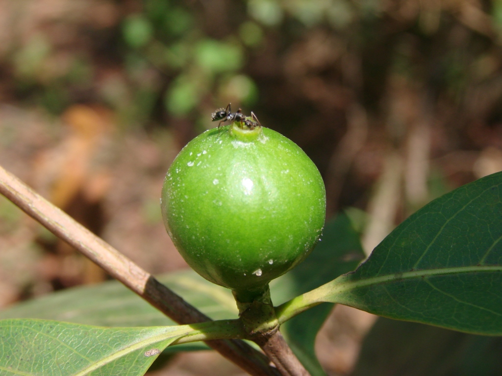 Alibertia edulis - RUBIACEAE Jardim Botânico de Brasília - Distrito Federal - Brasil.